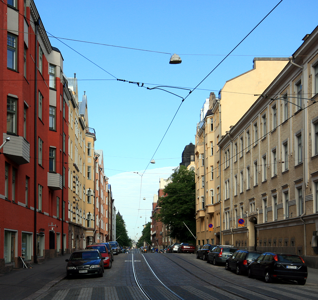 Tehtaankatu (Fabriksgatan), Helsinki.